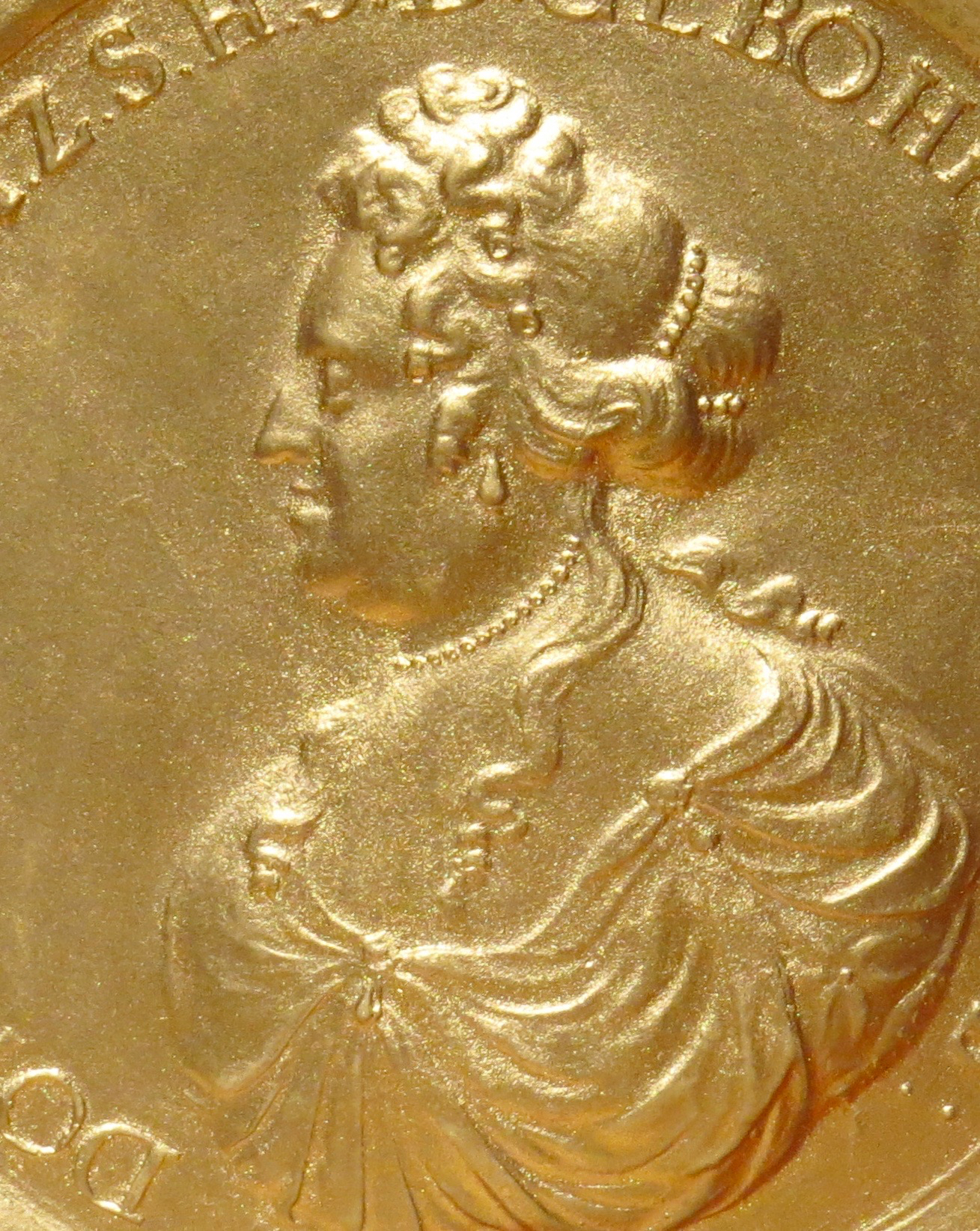 Gipsafstøbning af mønt med hertuginde Dorothea Sophie (1653-1722) af Slesvig-Holsten-Sønderborg-Pløns portræt. Sønderborg Slot